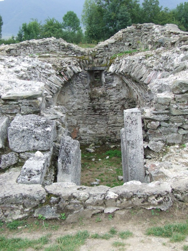 Sarmizegetuza, Hunedoara County, Romania